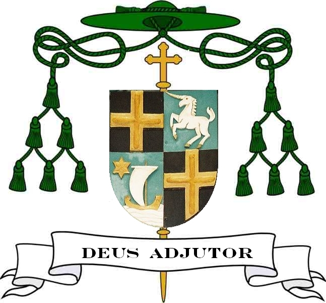 Wappen Carl Joseph Leiprecht 1903 - 1981 Bischof von Rottenburg (1949-1974)